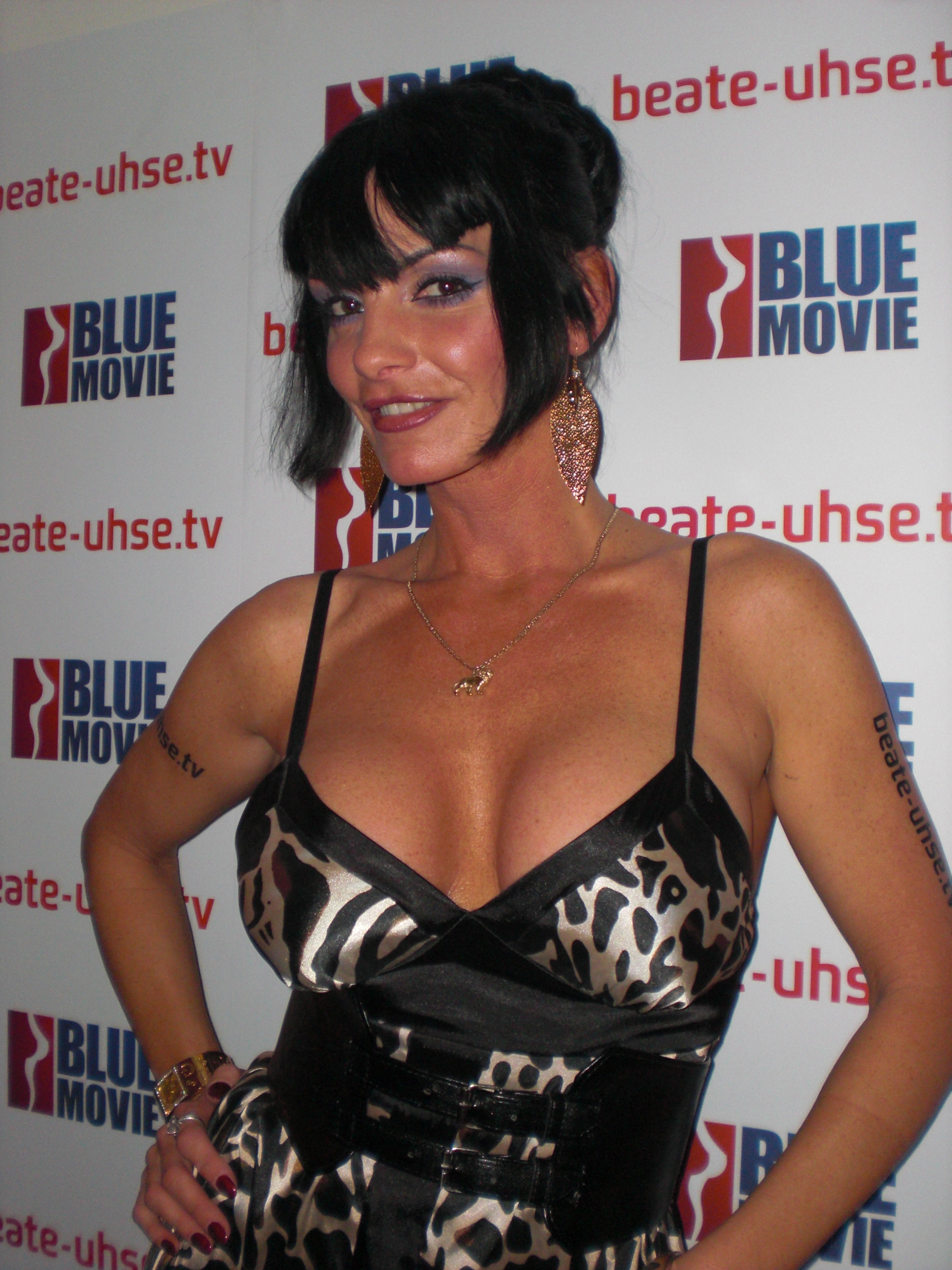 Carmen Rivera auf der VENUS-Messe